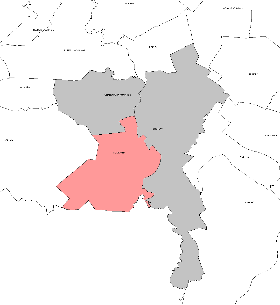 Katastrální členění Břeclavi, s vyznačením místní části Poštorná